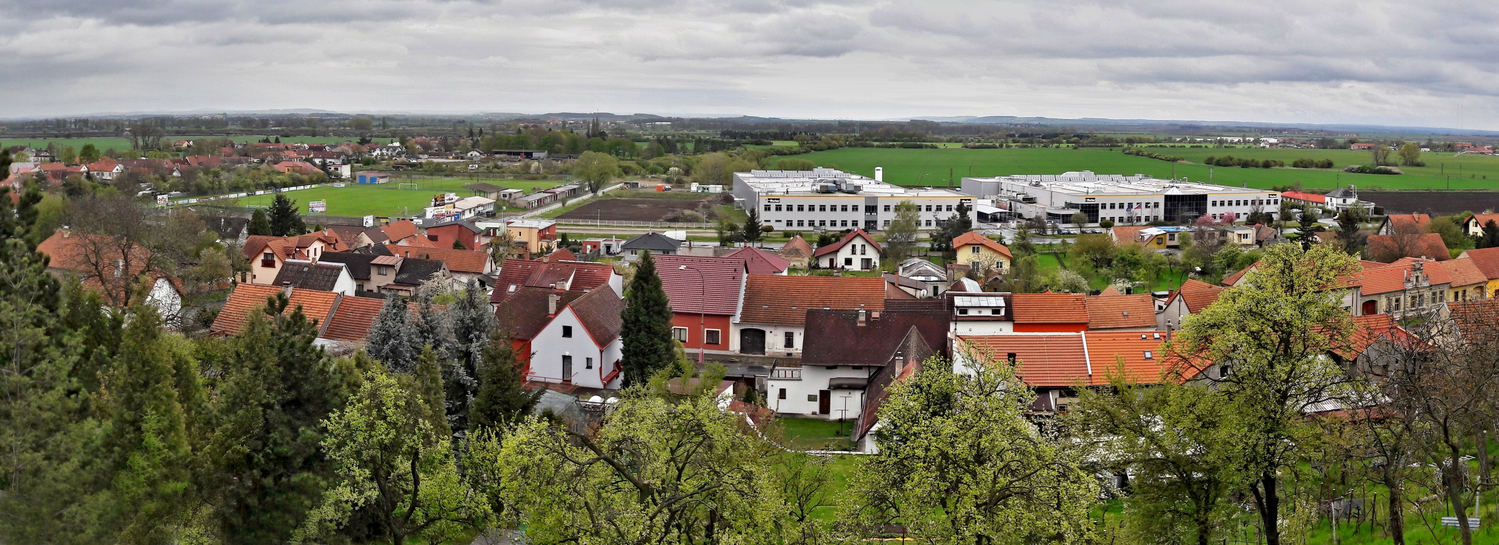 Sadská